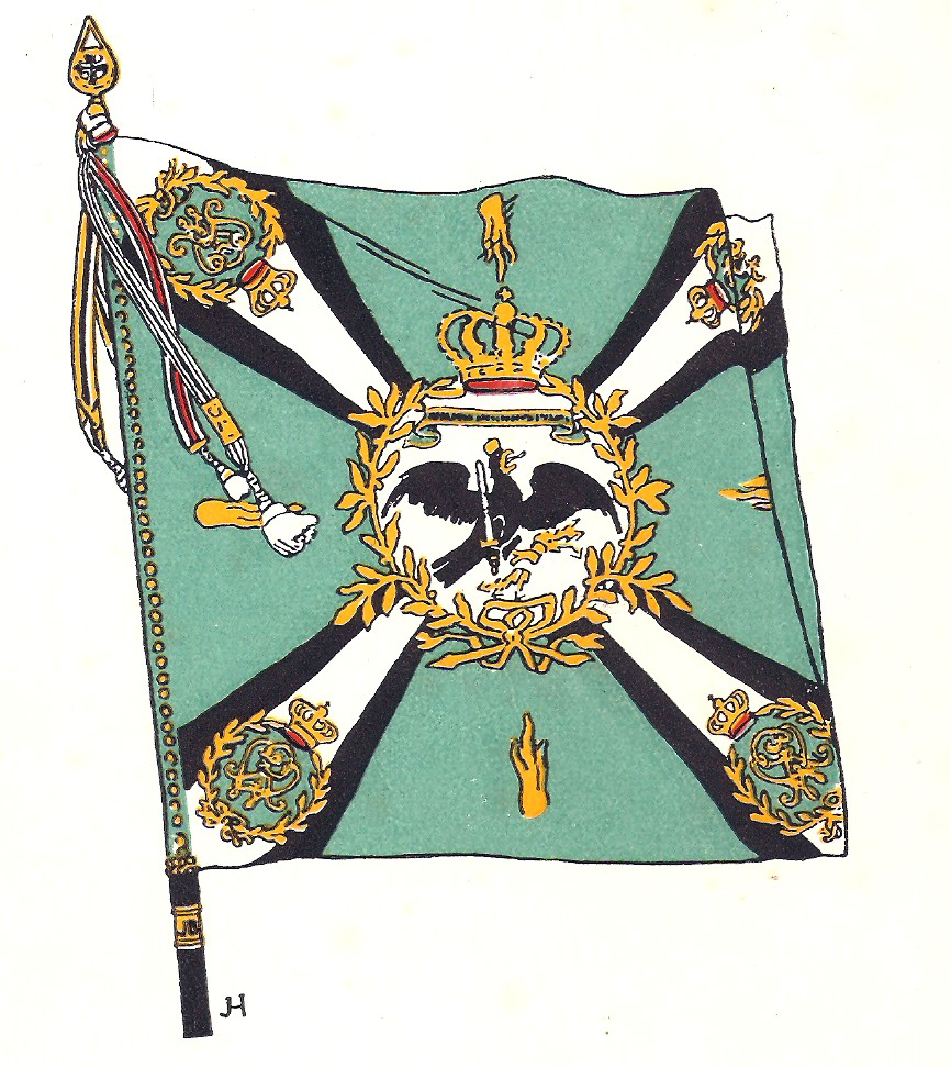 Fahne des Lauenburgischen Jäger-Bataillon Nr. 9, Inschrift: VIVE LE ROY ET SES CHASSEURS (Es lebe der König und seine Jäger)